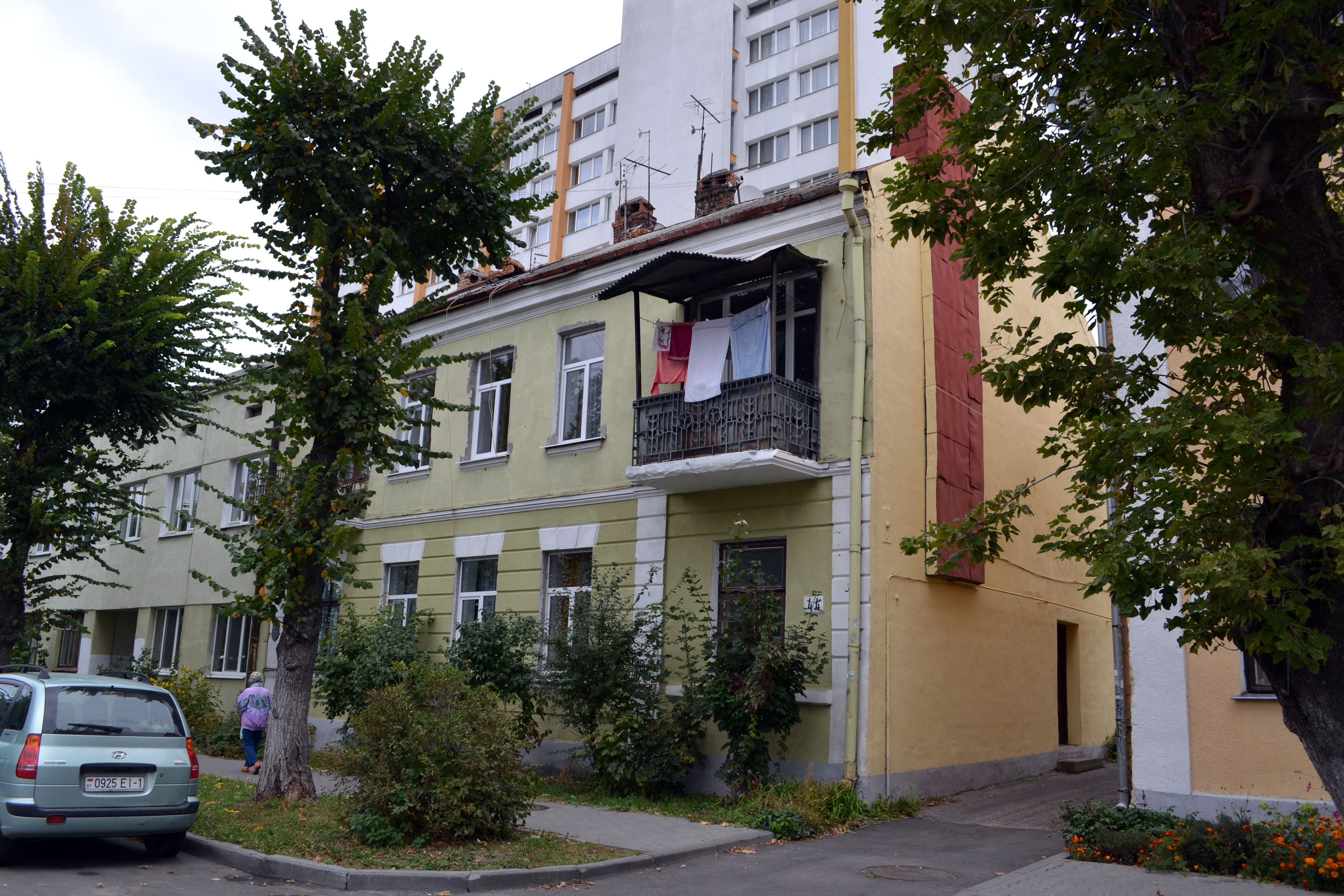 Беларуская (тарашкевіца): Гістарычны цэнтар м. Берасьця: будынкі і збудаваньні, пляніровачная структура, ляндшафт і культурны пляст. This is a photo of Belarusian heritage monument. Reference number: 112Е000002 ( WLM)